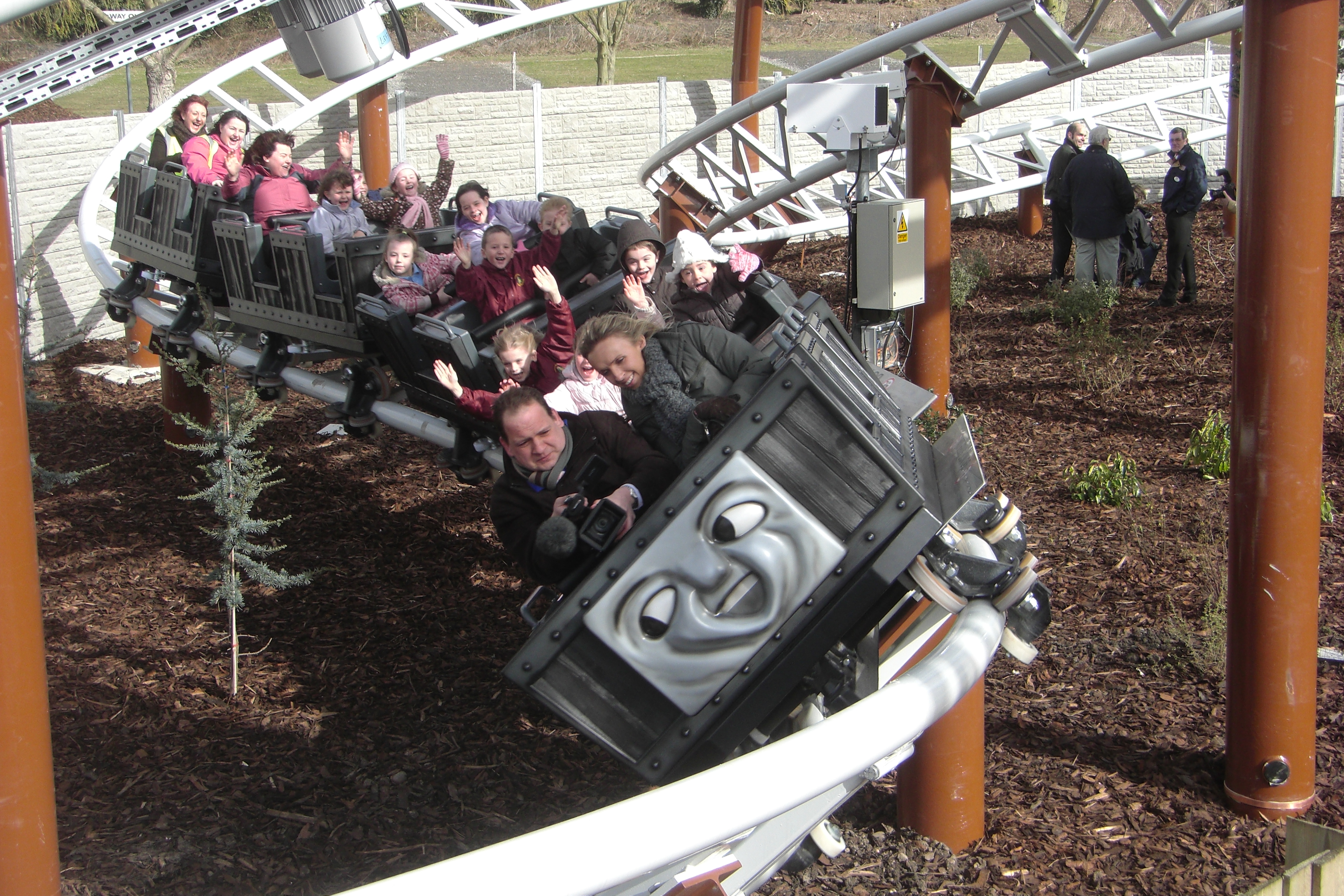 Gerstlauer Junior Coaster (Drayton Manor)